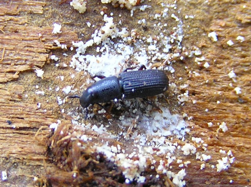 Hylastes ater, Zakorek czarny, Polska